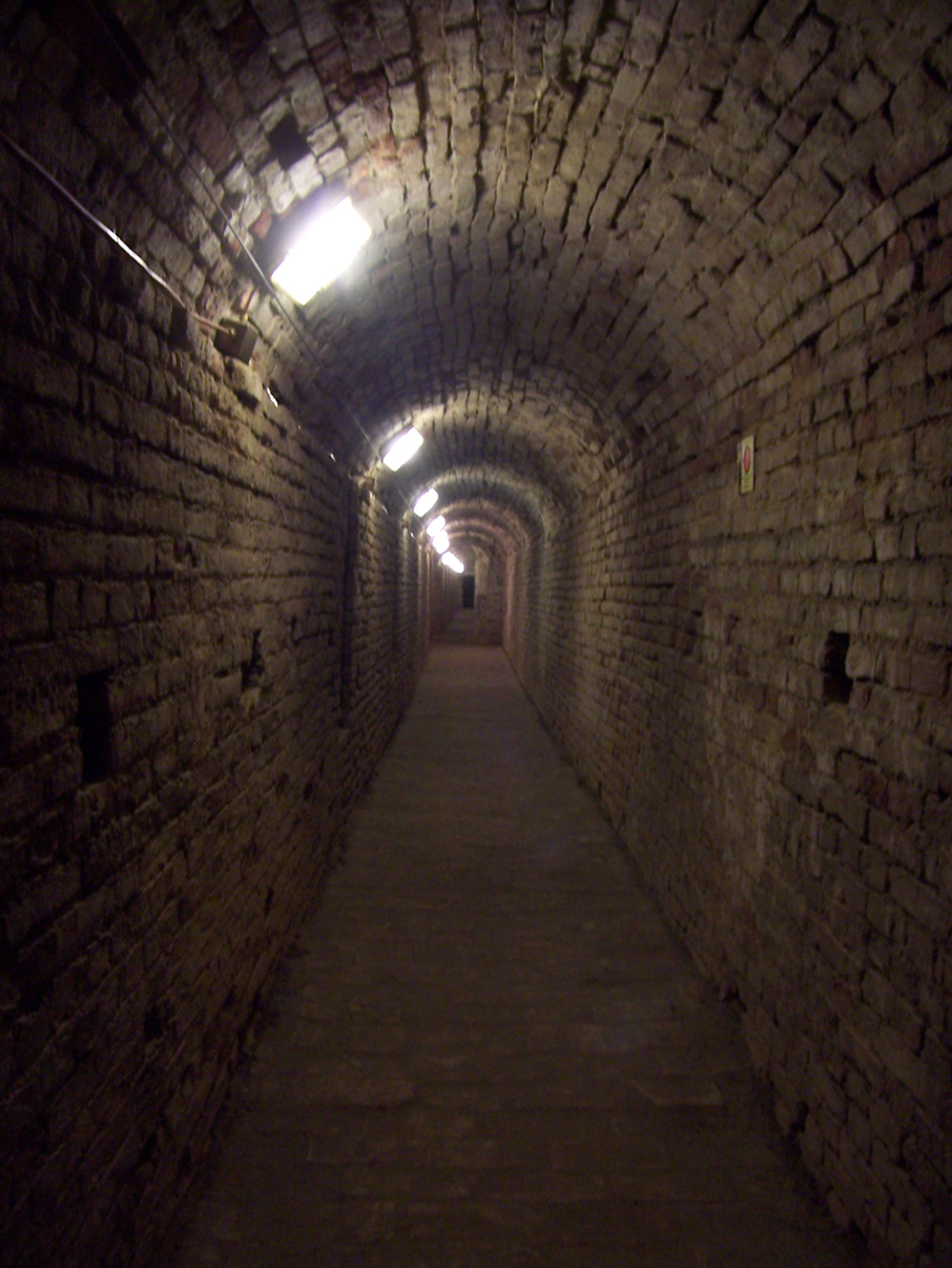 Corridoio dei fantasmi - Camminamenti interni della Rocca Malatestiana di Cesena